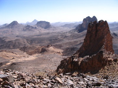 Sud de l'Algérie